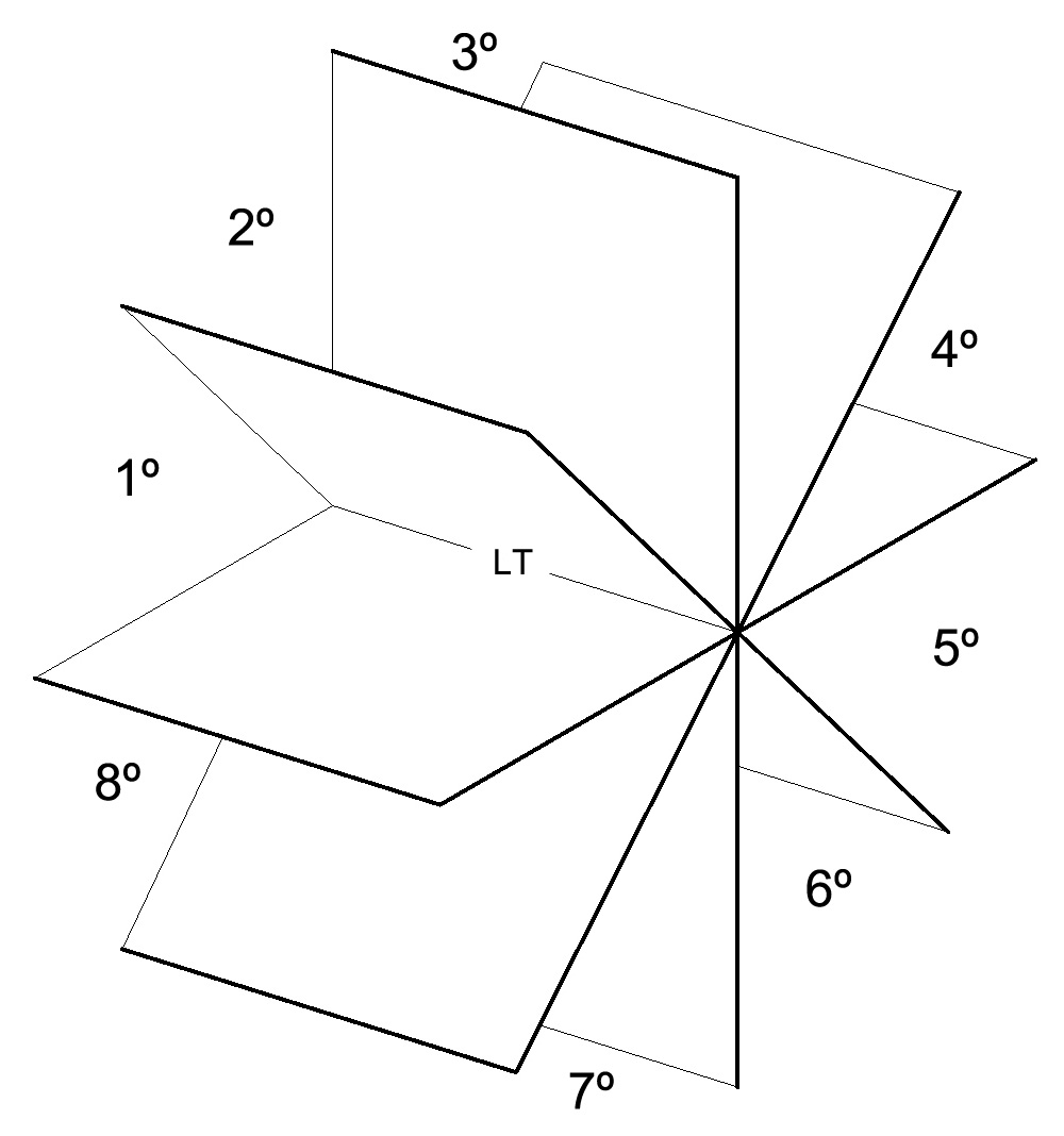 Oitantes, Octantes